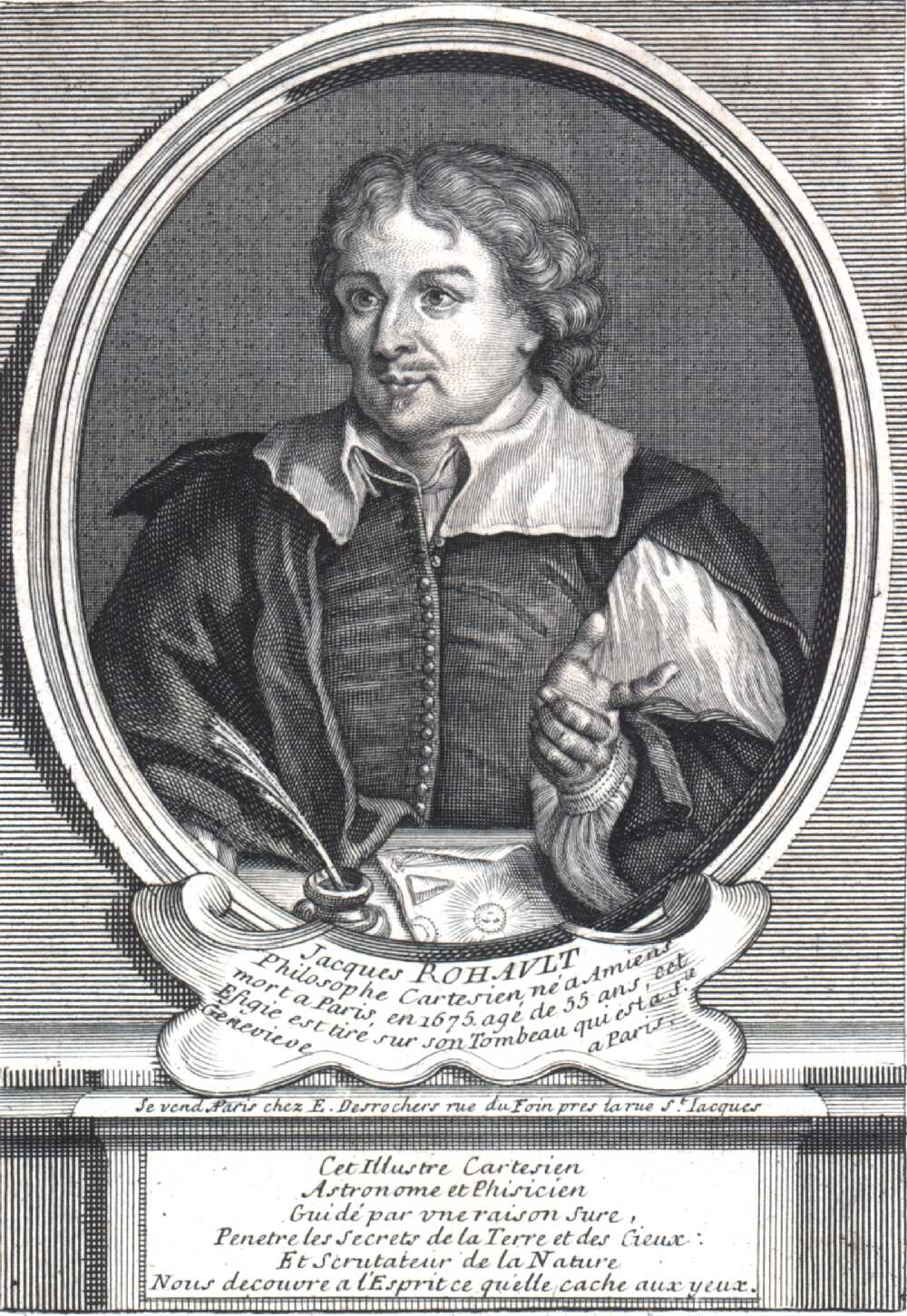 Portrait of Jacques Rohault